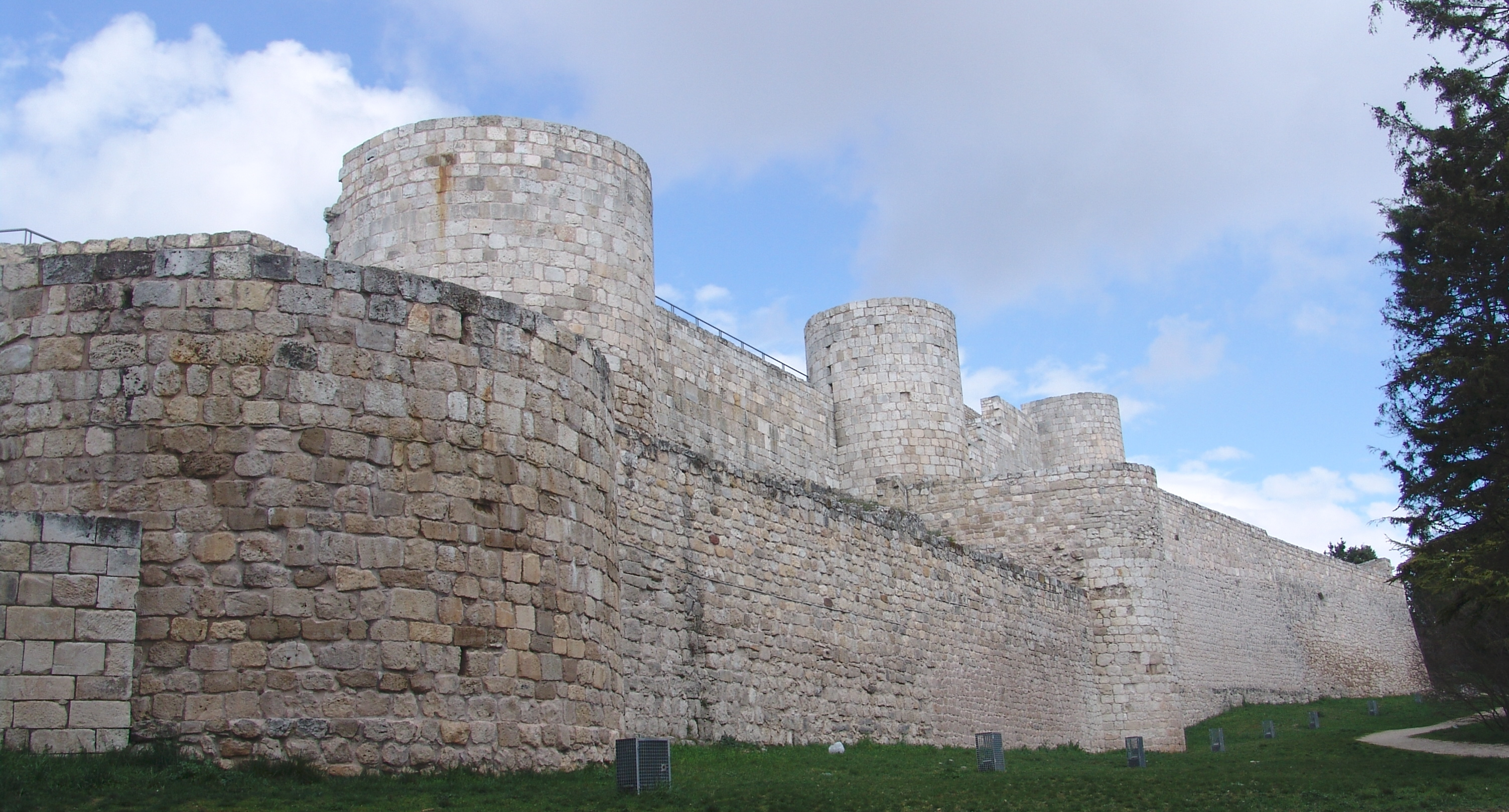 Exterior, Castillo, Burgos, España